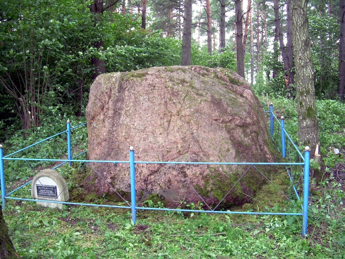 Белая. Валун Асілак